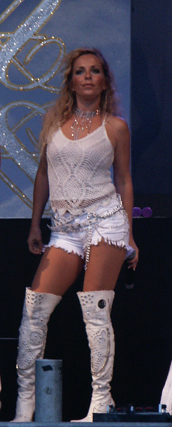 Tess Merkel, då Alcazar framträder på Stora Torget i Borås